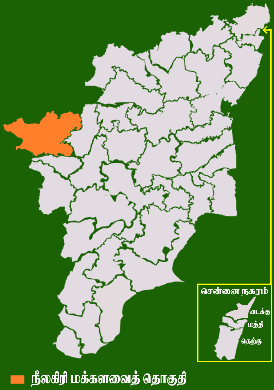 தமிழக வரைபடத்தில் உள்ள நீலகிரி மக்களவைத் தொகுதி